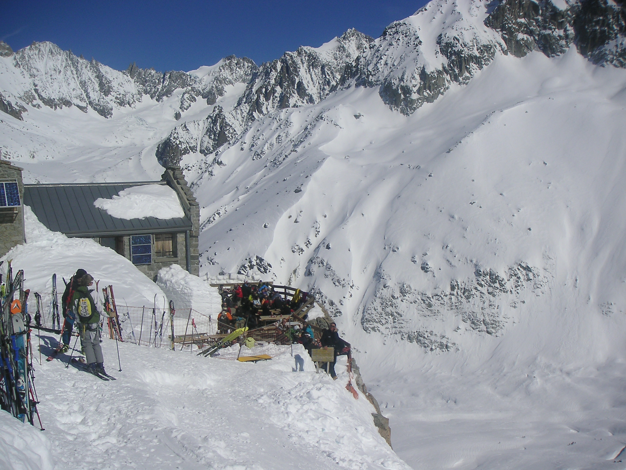 Vallée blanche - l'unique refuge